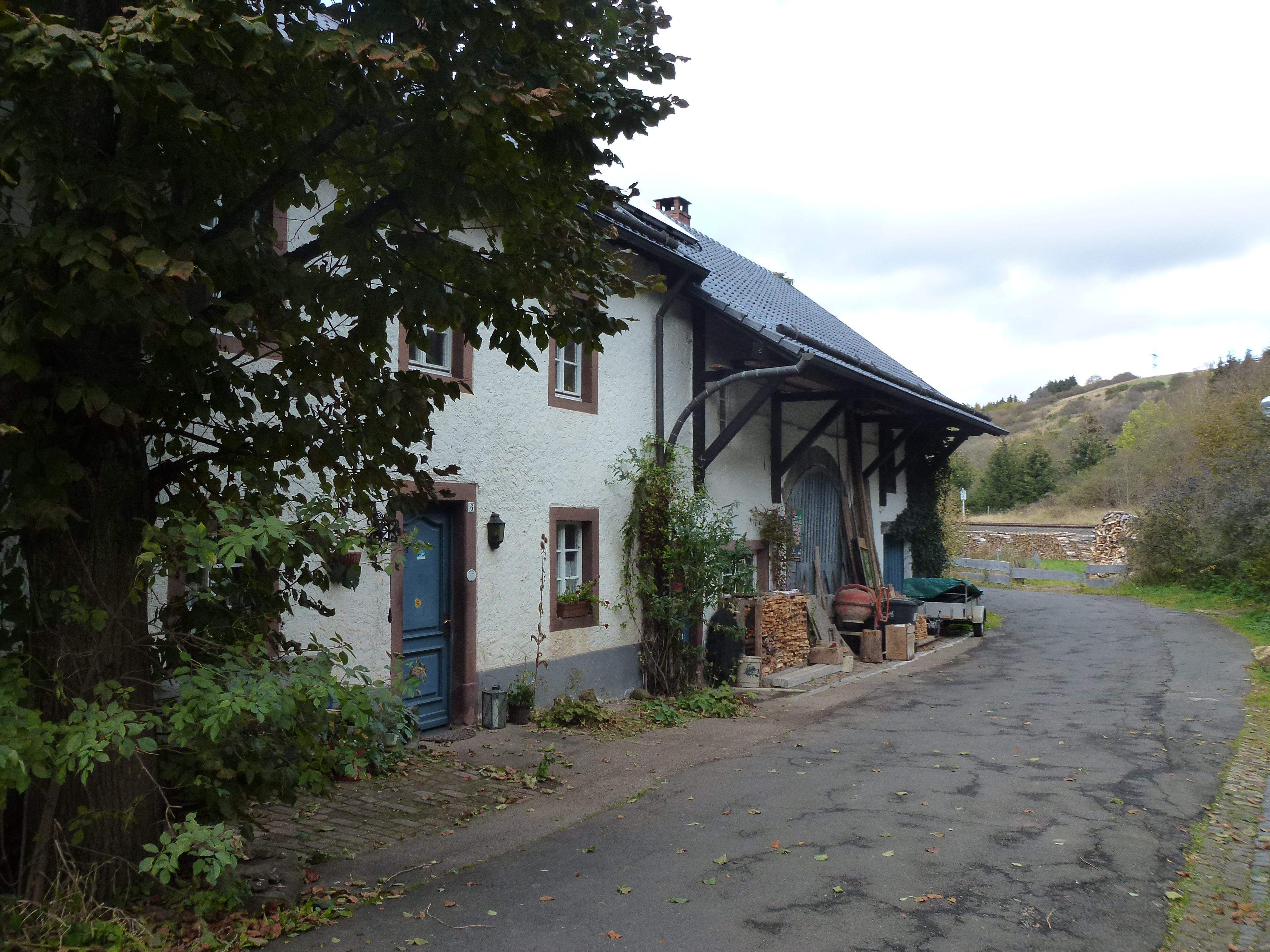 Streckhof Am Glaadtbach 6 Jünkerath Denkmal RP